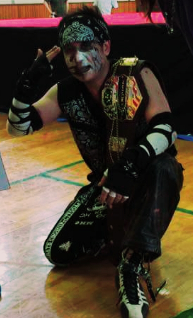 試合終了後のファンとの交流にて